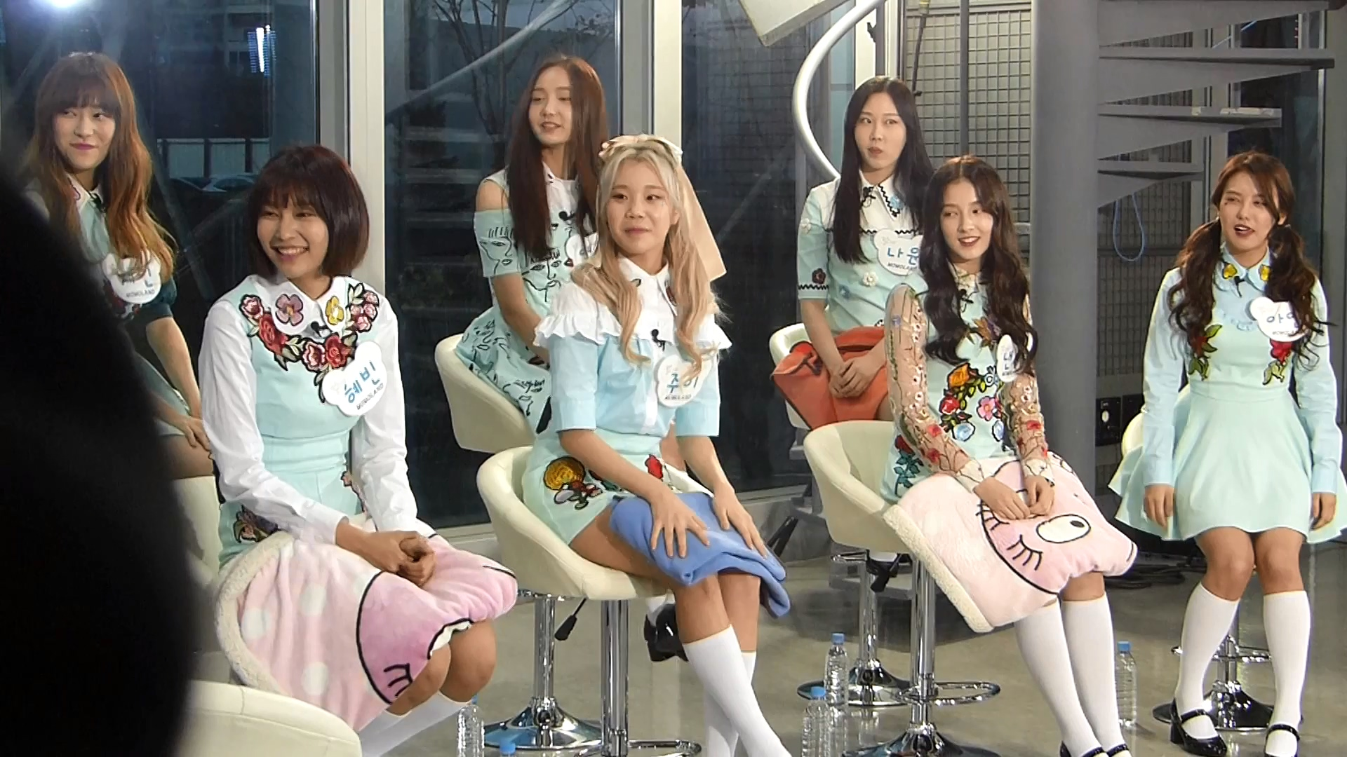 161129 tbs 모모랜드 직캠 팩트IN스타 27m03s